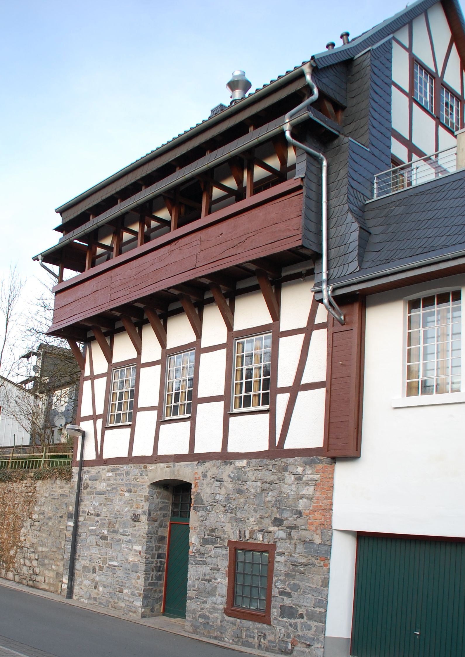 Hinterhaus von Haus Schennen, ehemalige Lohgerberei